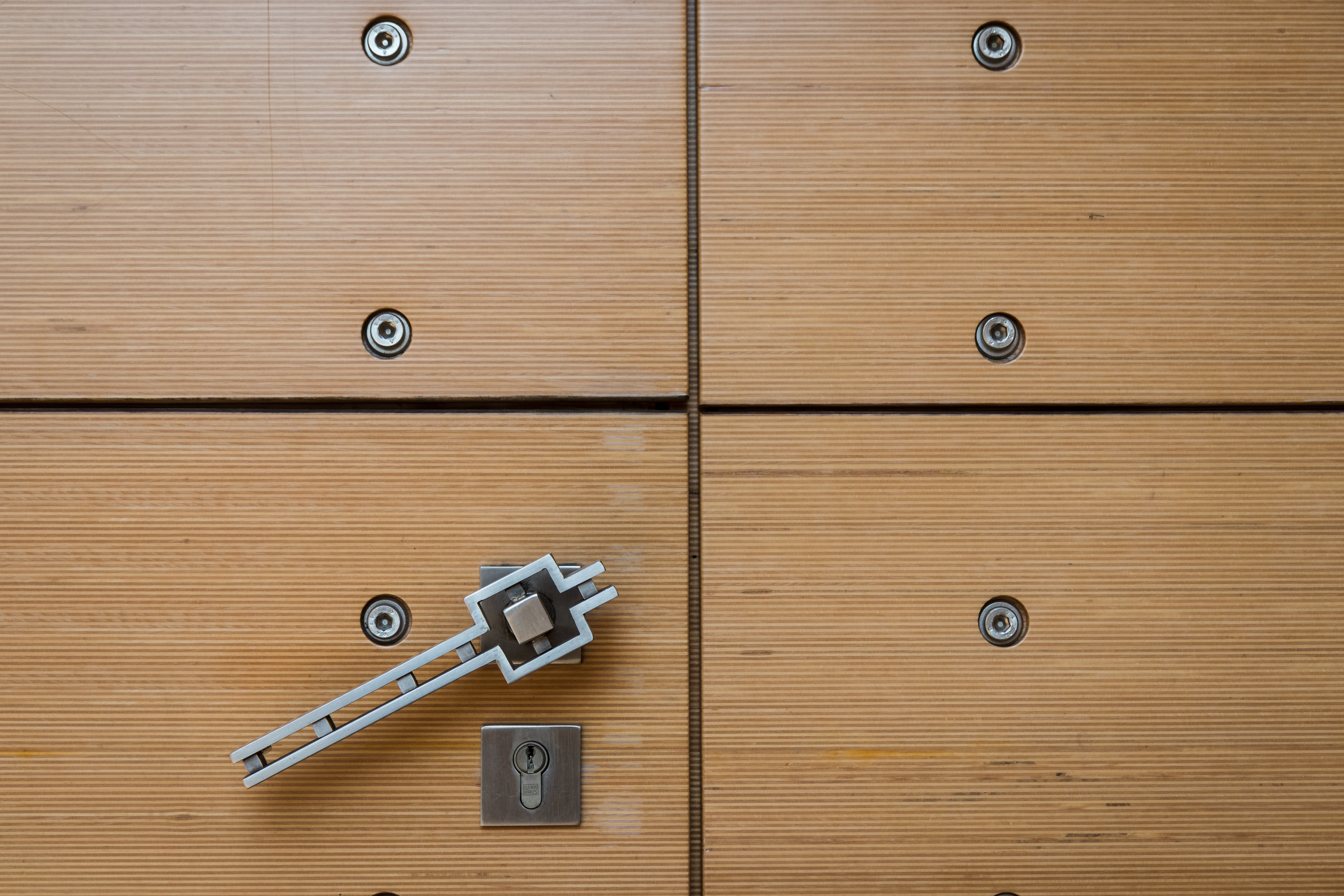 Katharina von Siena, Köln-Blumenberg. Architekten: Heinz und Nikolaus Bienefeld